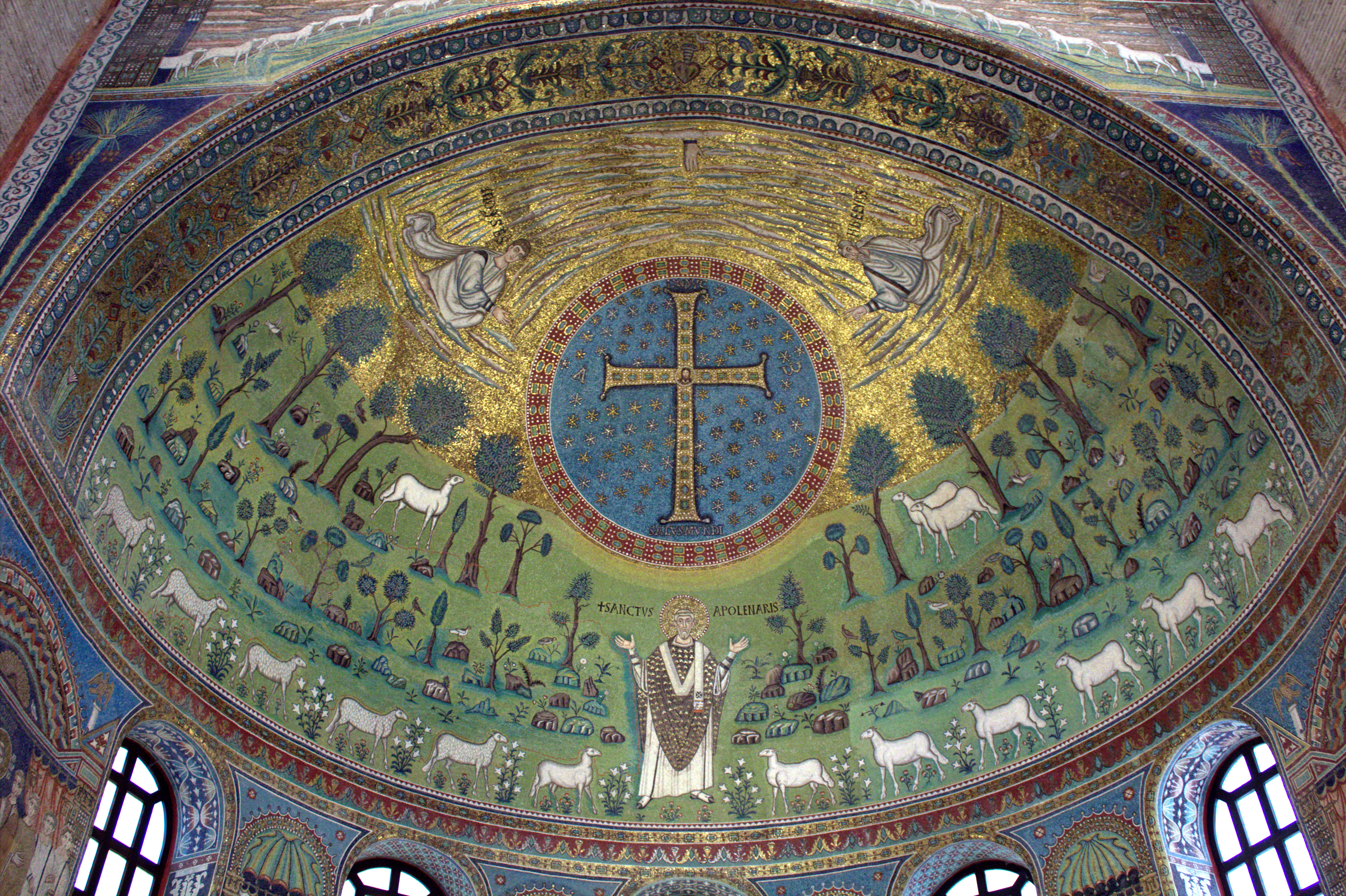 Abside di Sant'Apollinare in Classe, Ravenna